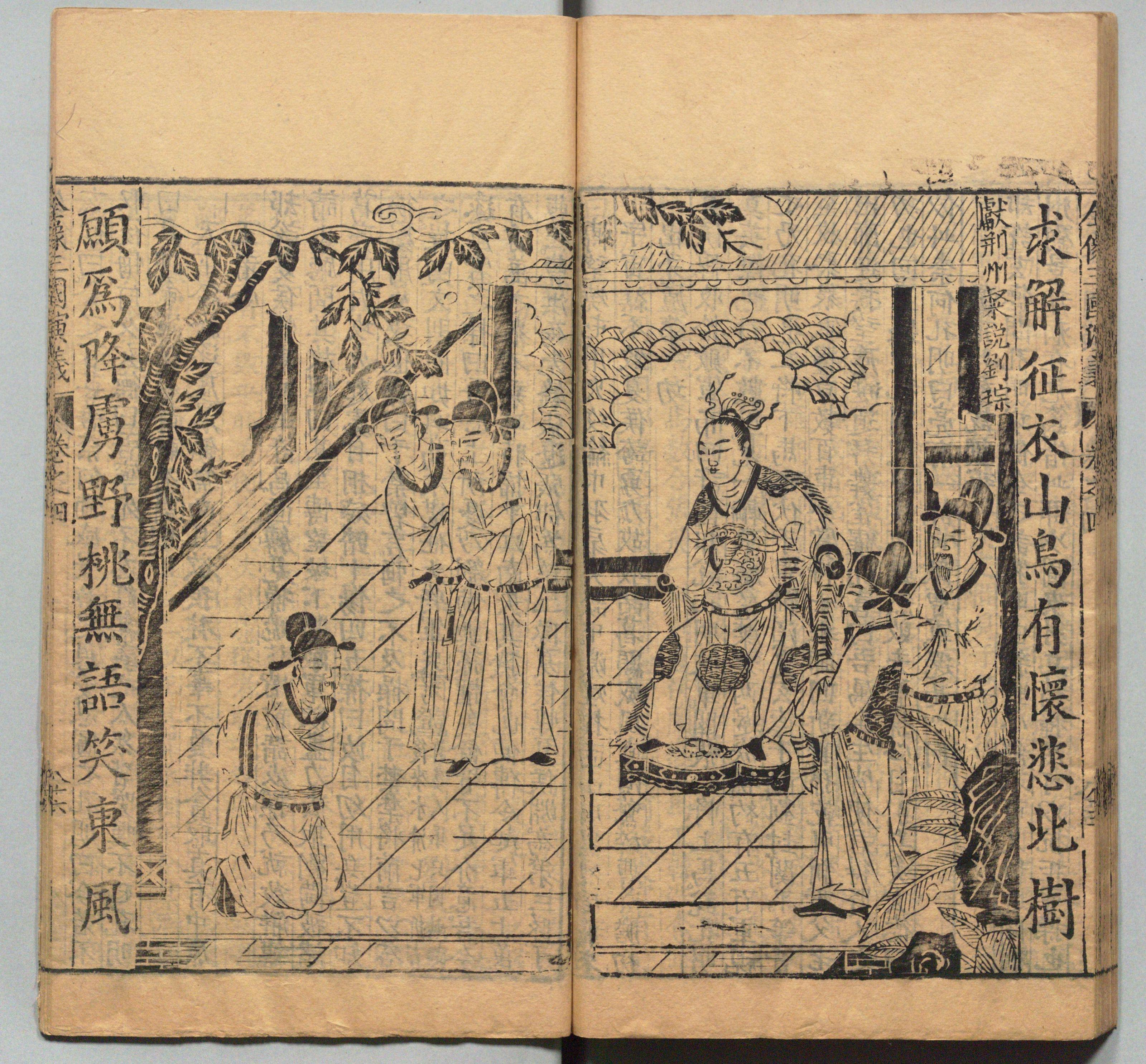 新刊校正古本大字音释三国志通俗演义 明万历十九年书林周曰校刊本